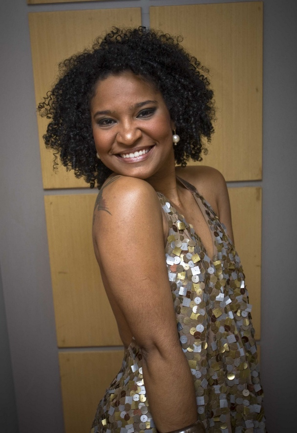 Larissa Luz vocalista da Banda Ara Ketu.